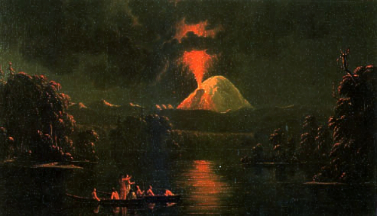 Mount St Helens erupting at night